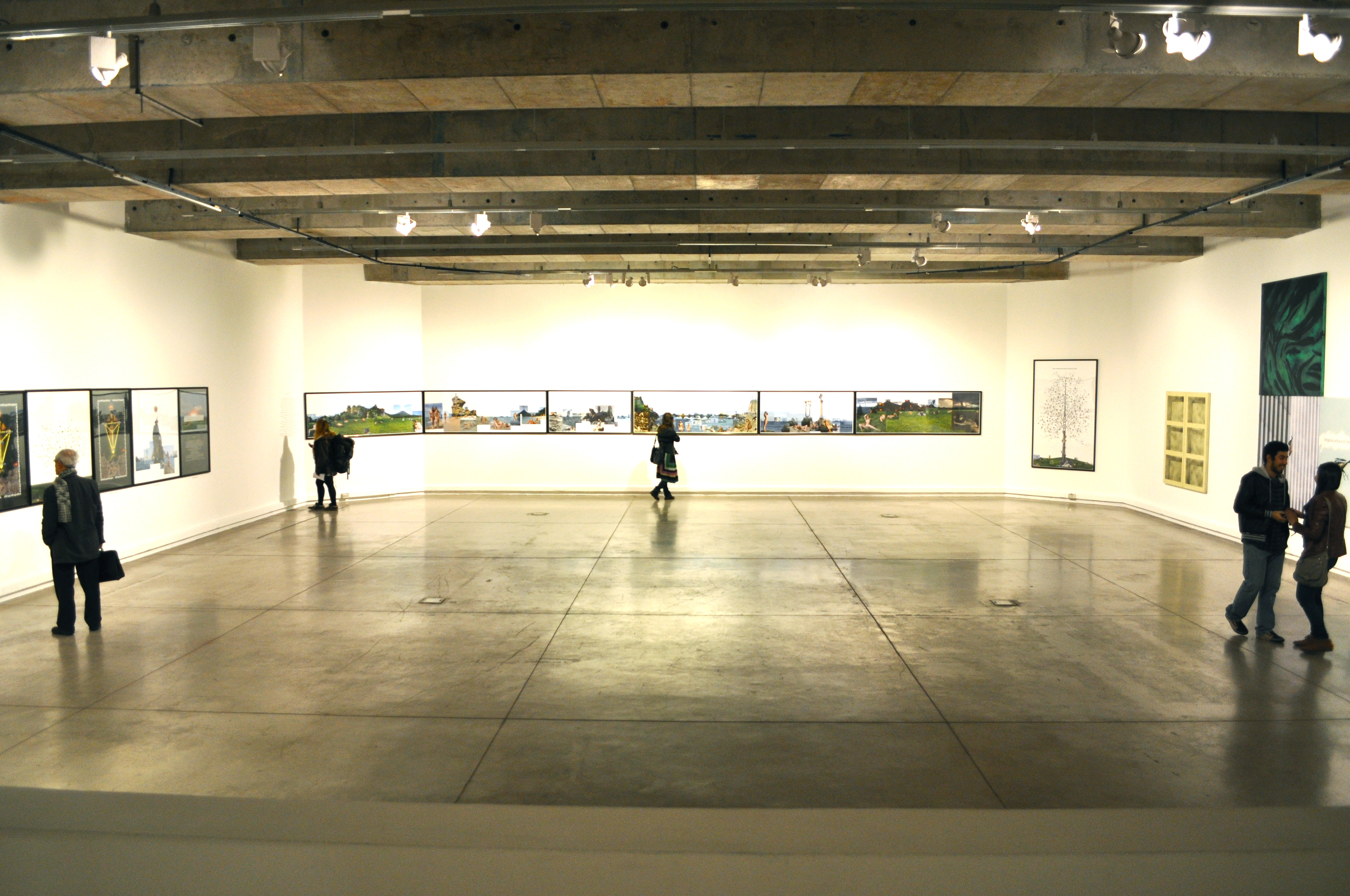 Sala del Santiago Museum of Contemporary Art Native nameMuseo de Arte Contemporáneo de SantiagoLocationSantiagoCoordinates33° 26′ 06.58″ S, 70° 38′ 39.15″ W Established1947Web page control : Q605703 VIAF: 151566914 ISNI: 0000 0001 2331 9039 institution QS:P195,Q605703 .